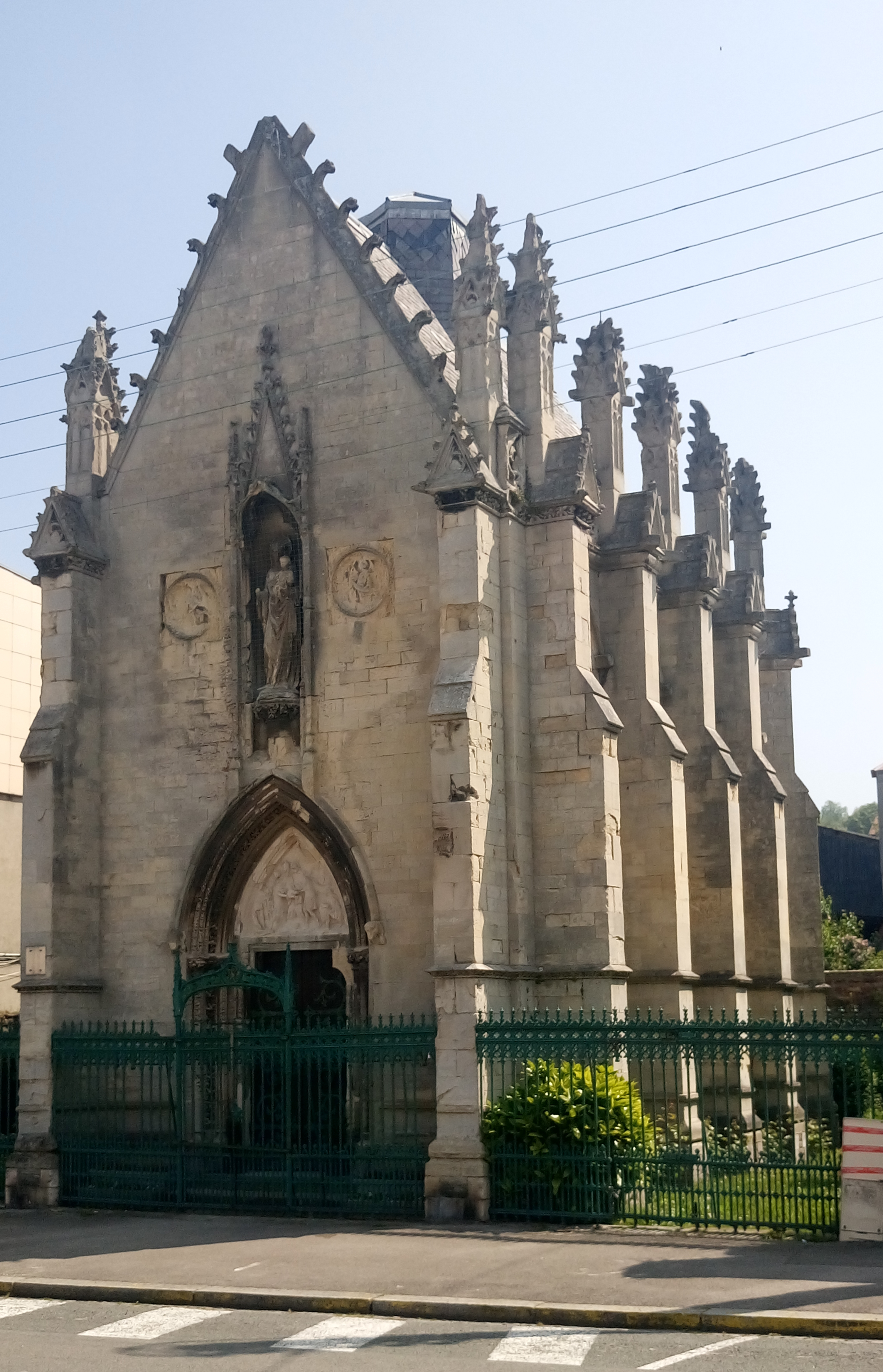 Chapelle du Saint Sang